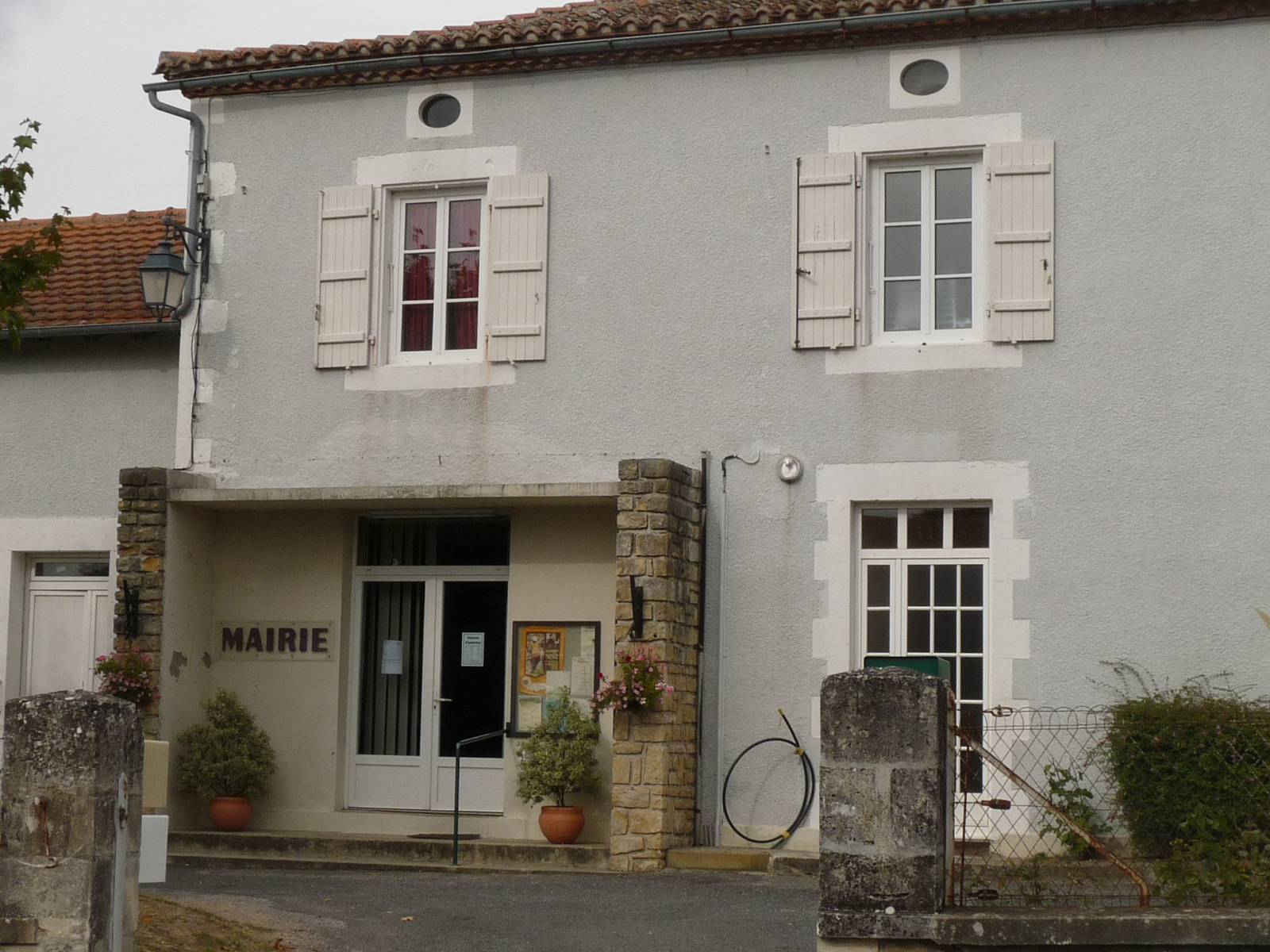 mairie d'Hiesse, Charente, France